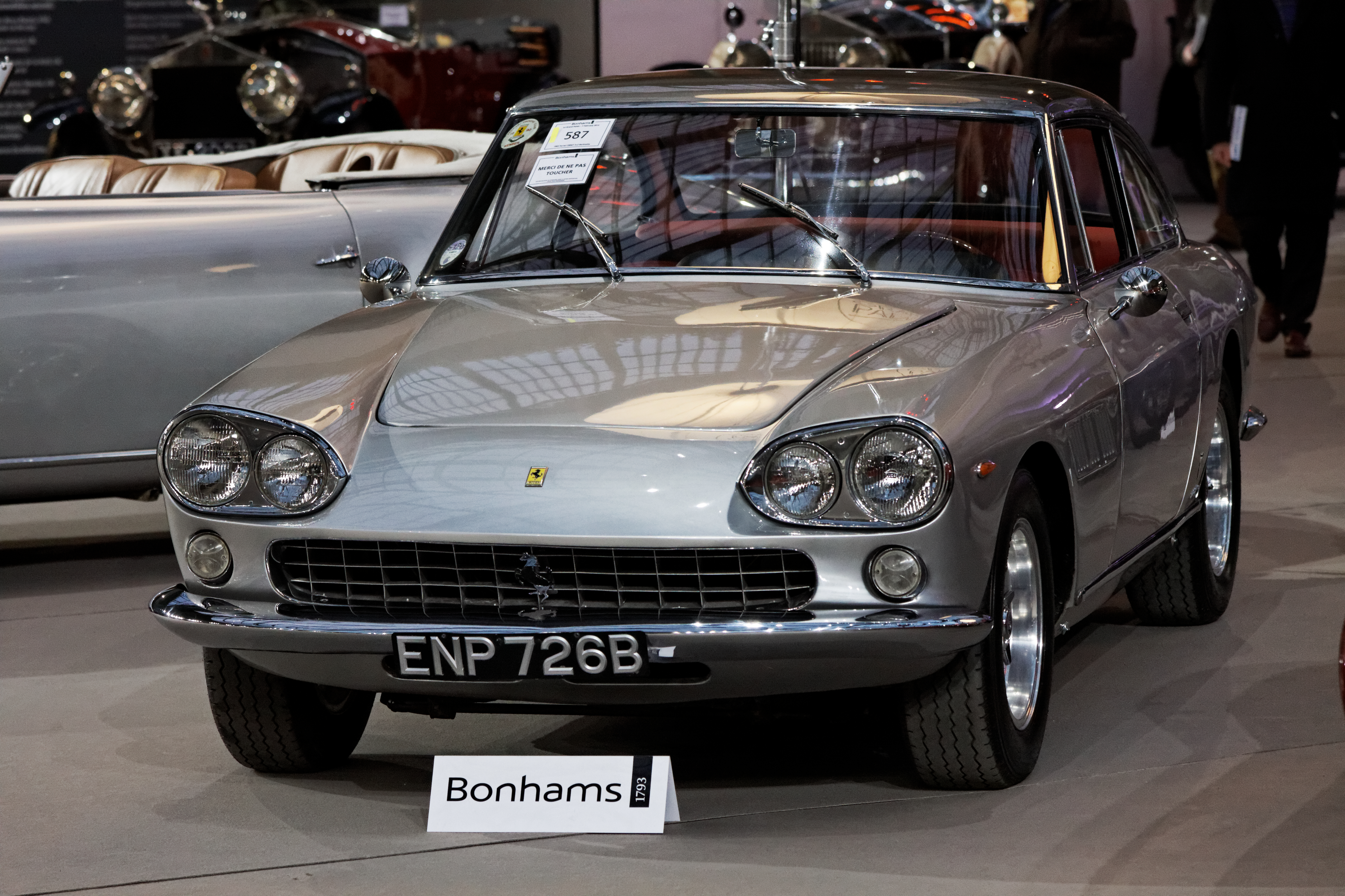 Une Ferrari 330GT 2+2 berlinette de 1965.